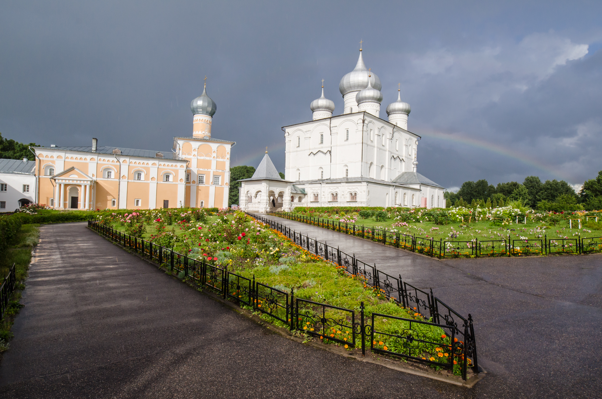 Хутынский Варлаамов монастырь (руины): Хутынь, Новгородский район, Новгородская область